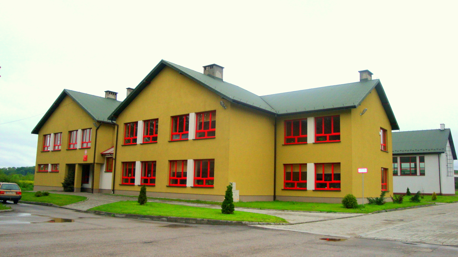 Zespół Szkolno-Gimnazjalny w Sierosławicach